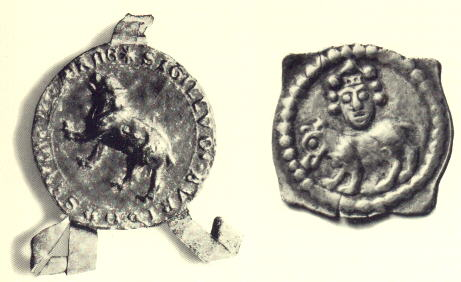 links: Siegel der Stadt Bern aus dem Jahr 1224, den (heraldisch) nach rechts schreitenden Bären, das Wappen der Stadt Bern zeigend; rechts: Berner Münze von 1274-1290, einseitiger vierzipfliger Pfennig, den nach links schreitenden Bären mit Königskopf darüber zeigend